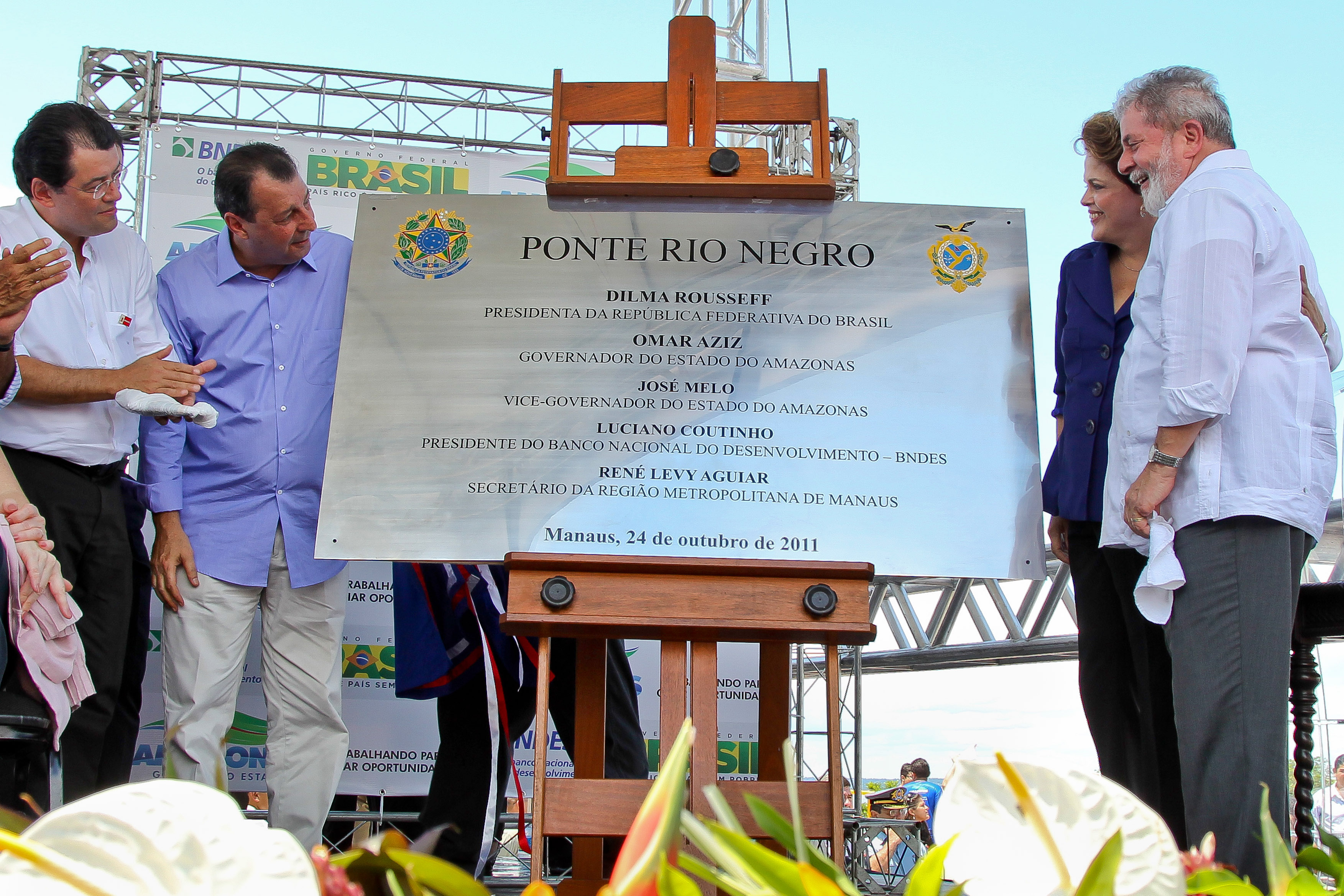 Autoridades inauguram a Ponte Rio Negro em 24 de outubro de 2011, no aniversário de Manaus.